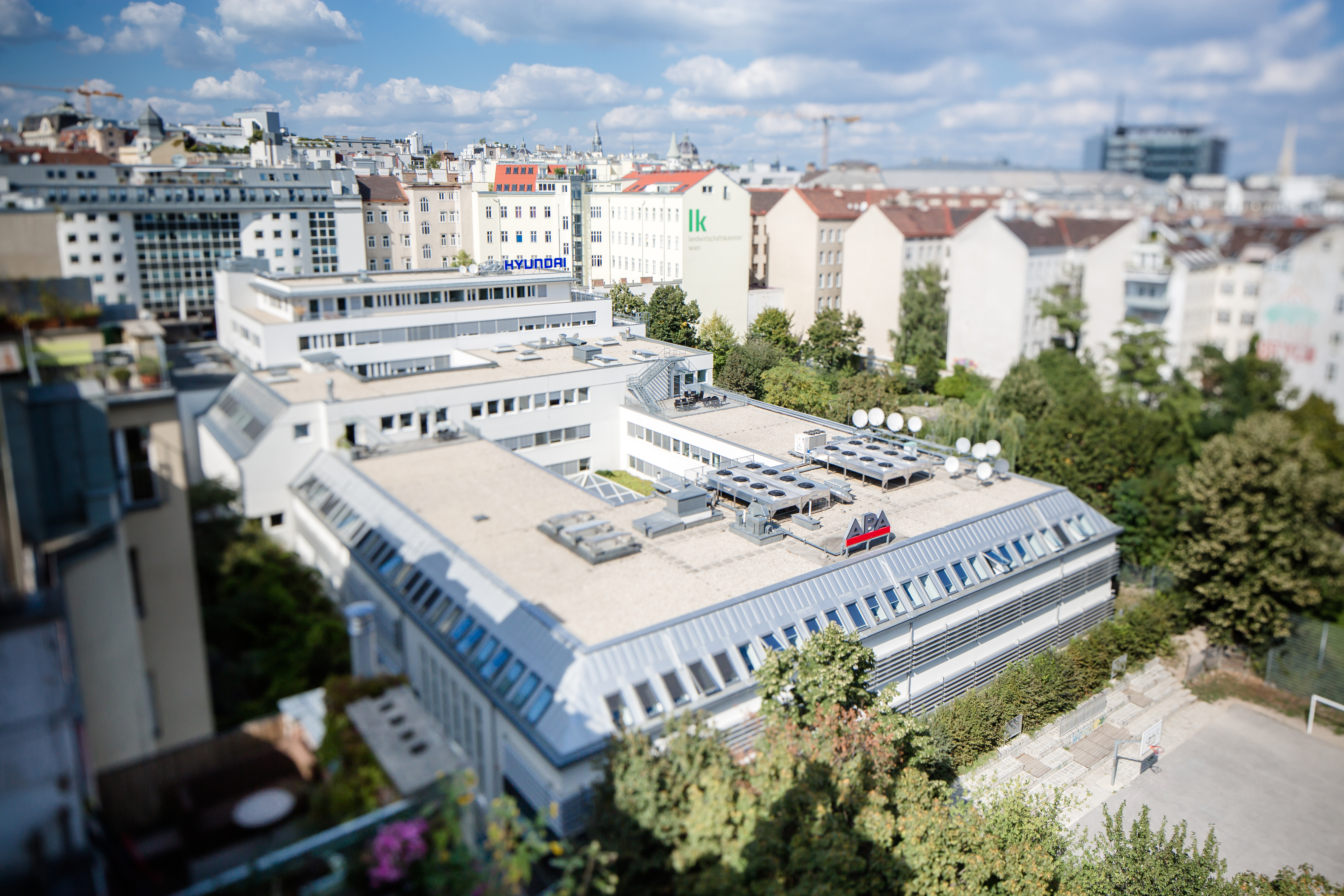 Das Gebäude der APA-Zentrale, Wien, Laimgrubengasse 10, von oben